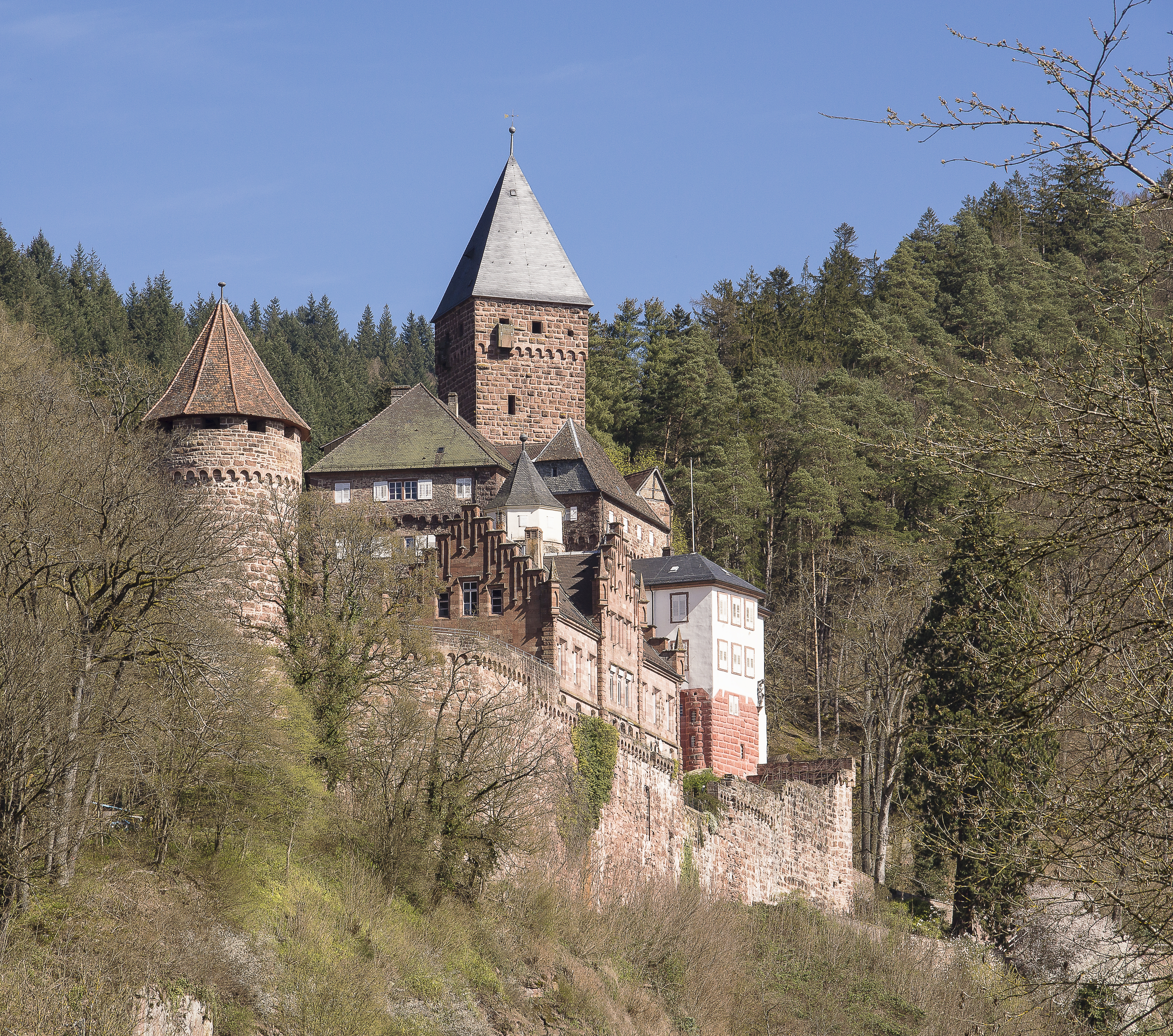 Schloss Zwingenberg